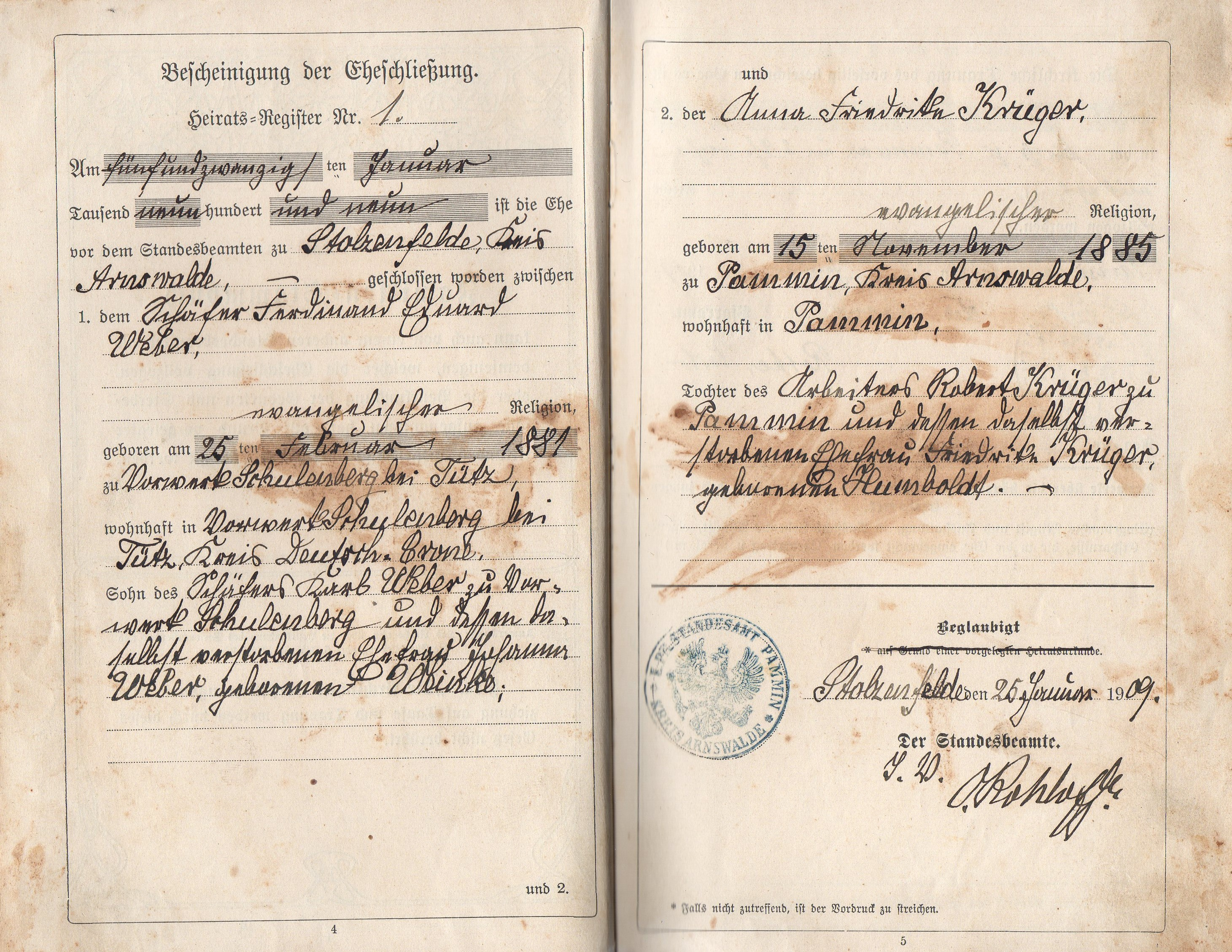 Bescheinigung der Eheschließung - Ferdinand Weber & Anna Krüger (1909)